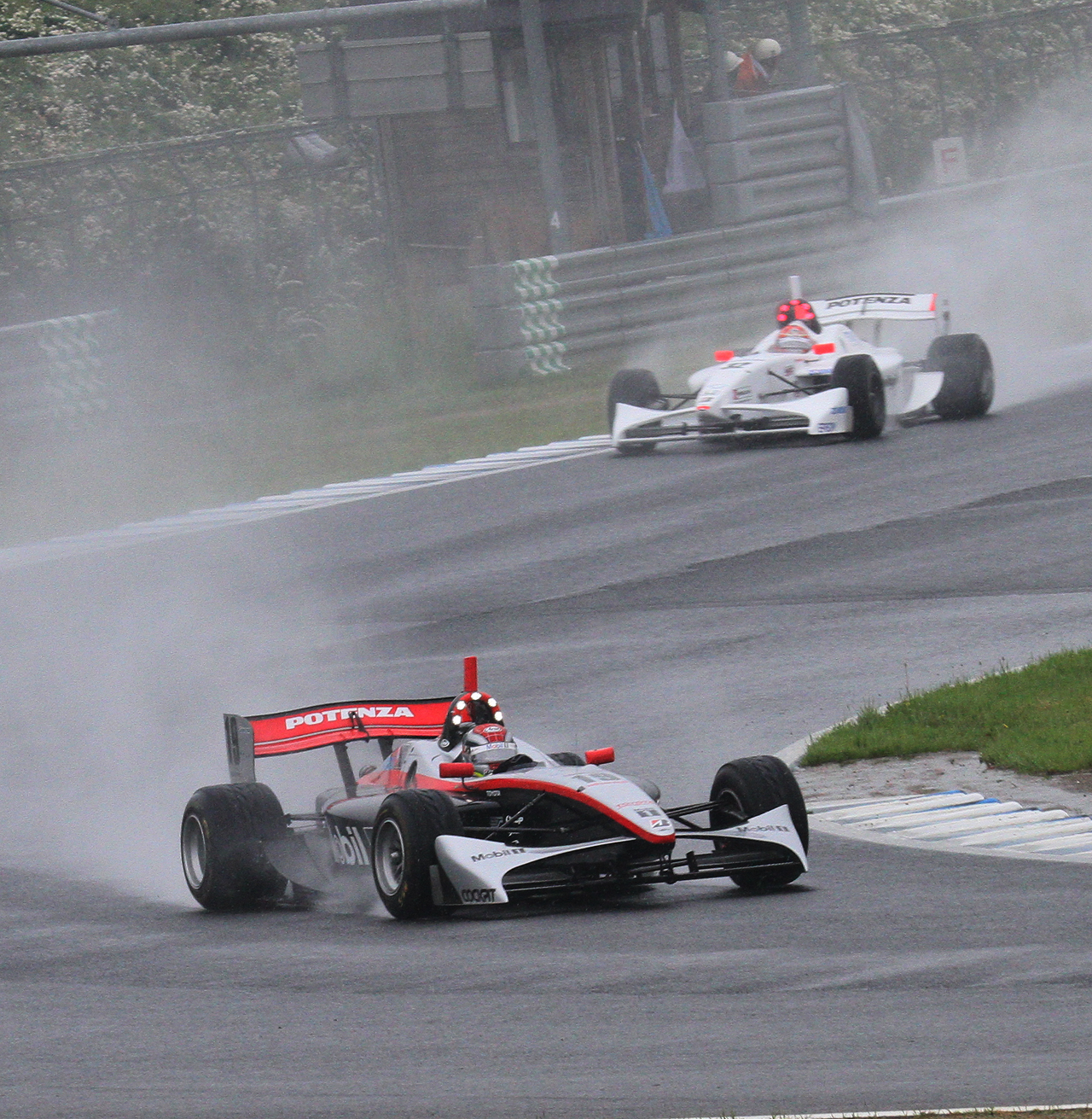 Formula Nippon 2010 Rd.2 Motegi: João Paulo de Oliveira (Team Impul) leading the race.